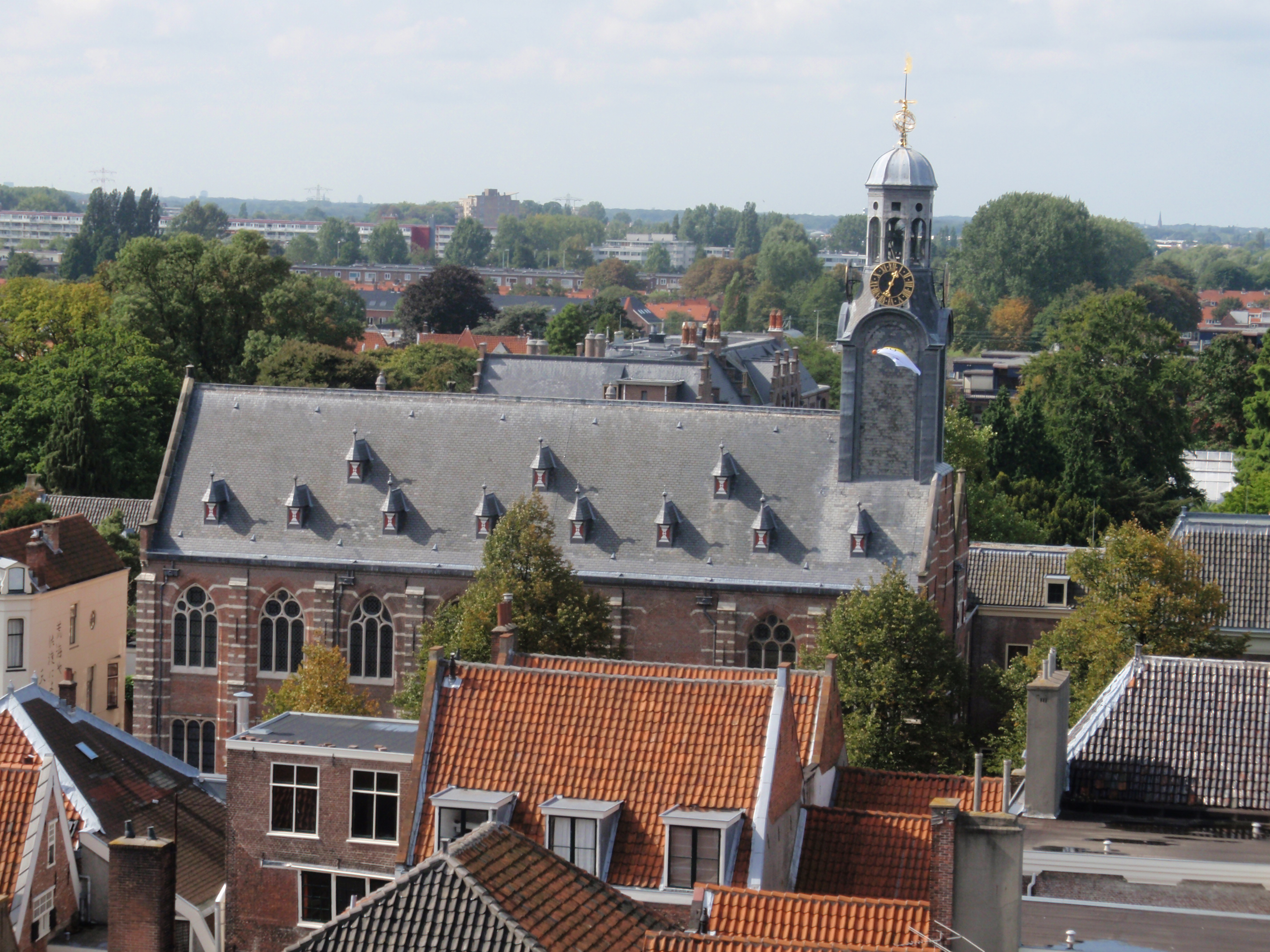 Foto uit Leiden tijdens rijksmonumentendag 2010.